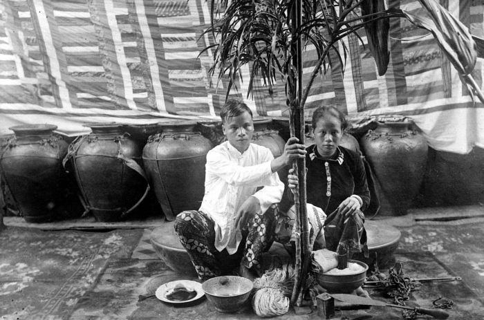 Repronegatief. Dajaks huwelijksfeest in Melawi, Sintang, Borneo